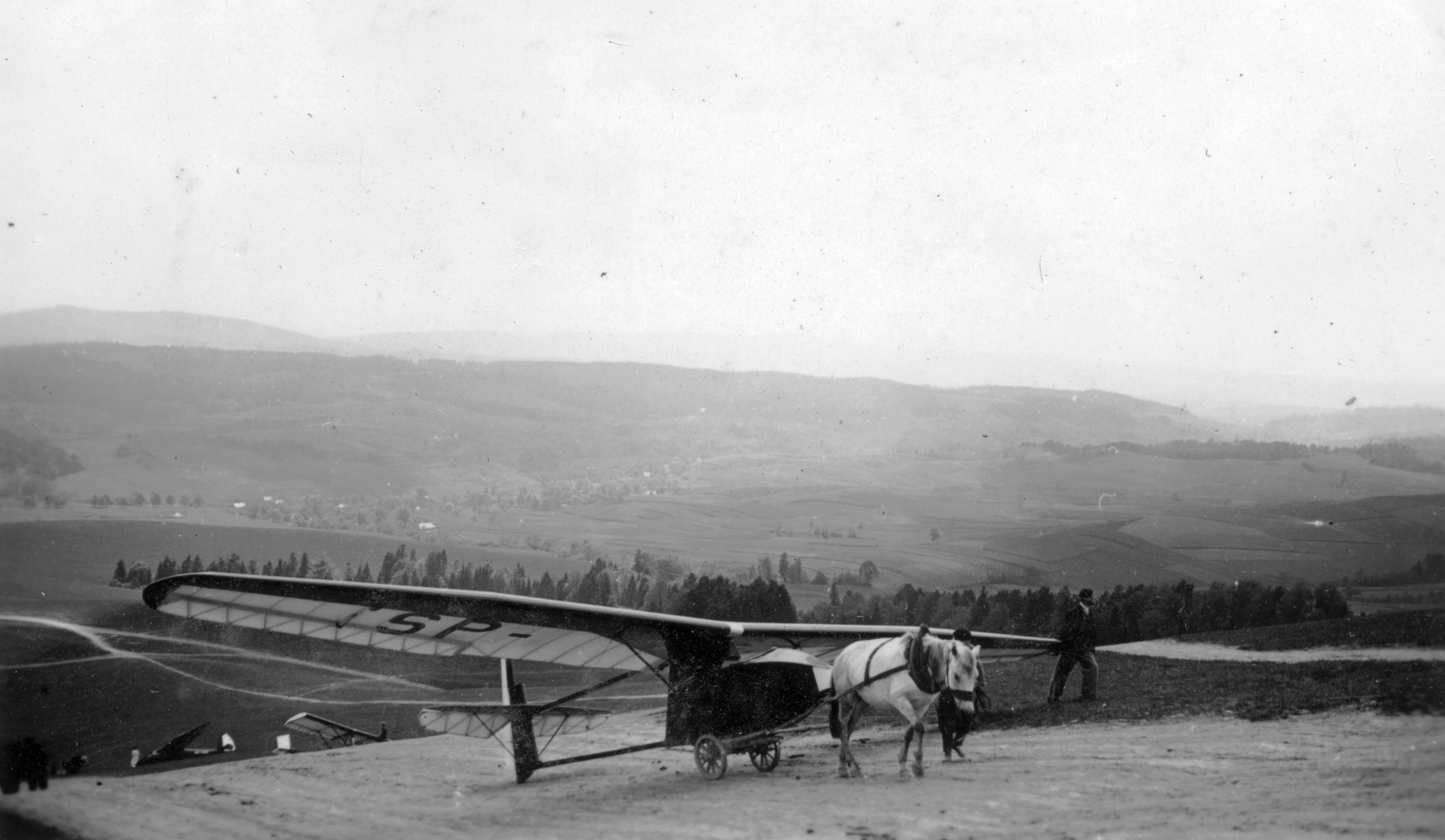 vitorlázórepülőtér. IS-A Salamandra típusú vitorlázó repülőgép. Location: Poland, Bezmiechowa Tags: airport, sailplane, W.W.S.-brand, Polish brand, airplane, horse, coach Title: vitorlázórepülőtér. IS-A Salamandra típusú vitorlázó repülőgép.